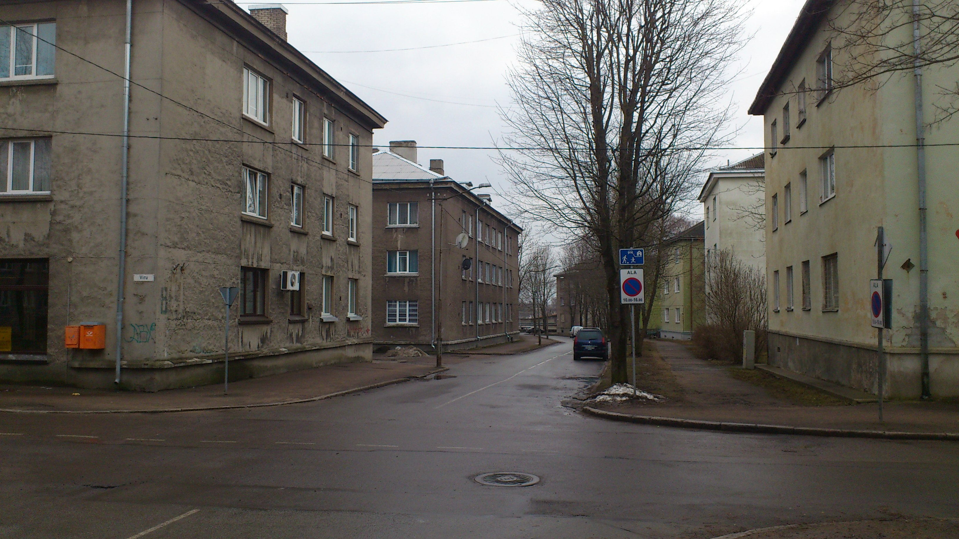 Suur tänav. Ristmik Viru tänavaga.